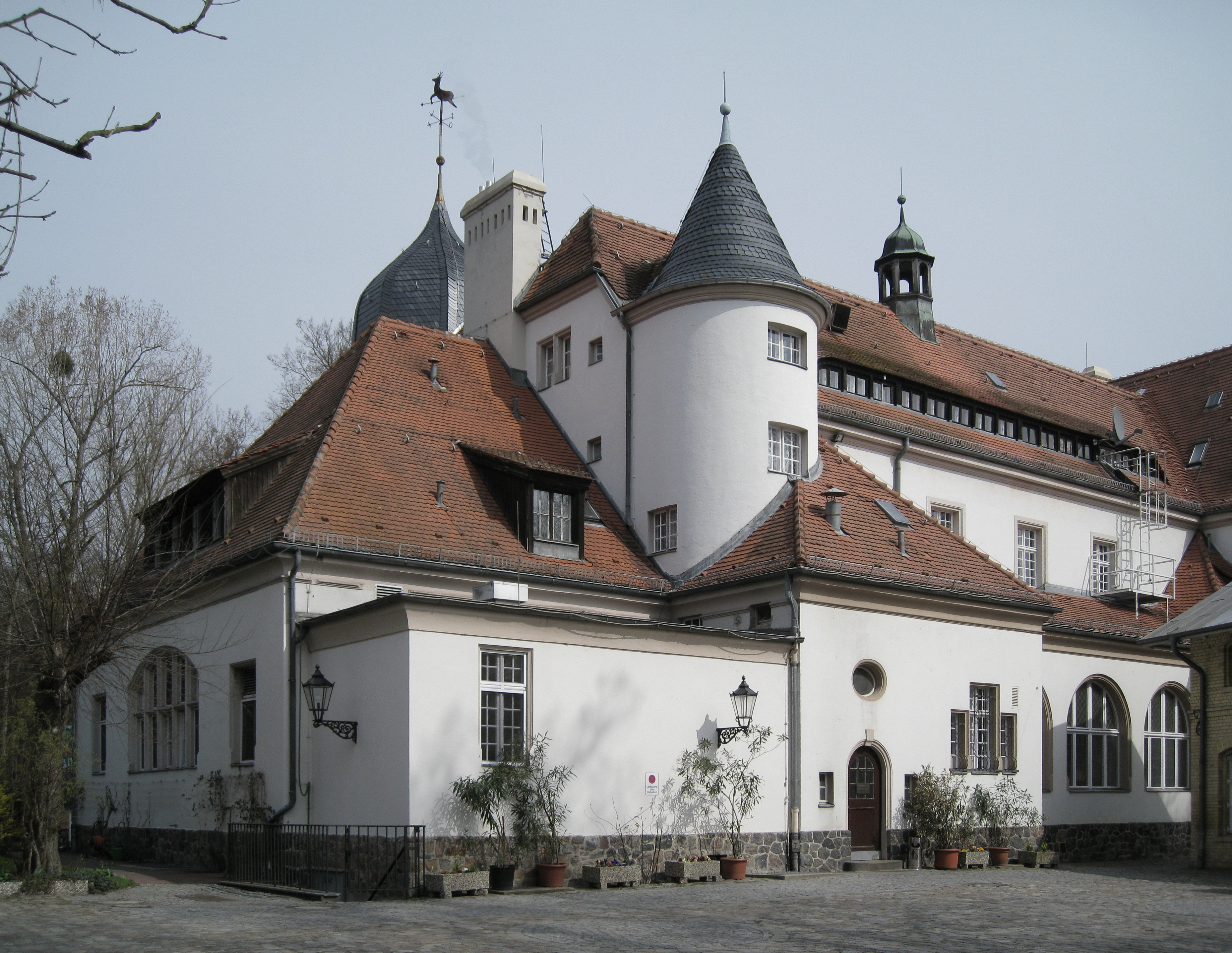 Restaurant Haus Paulsborn